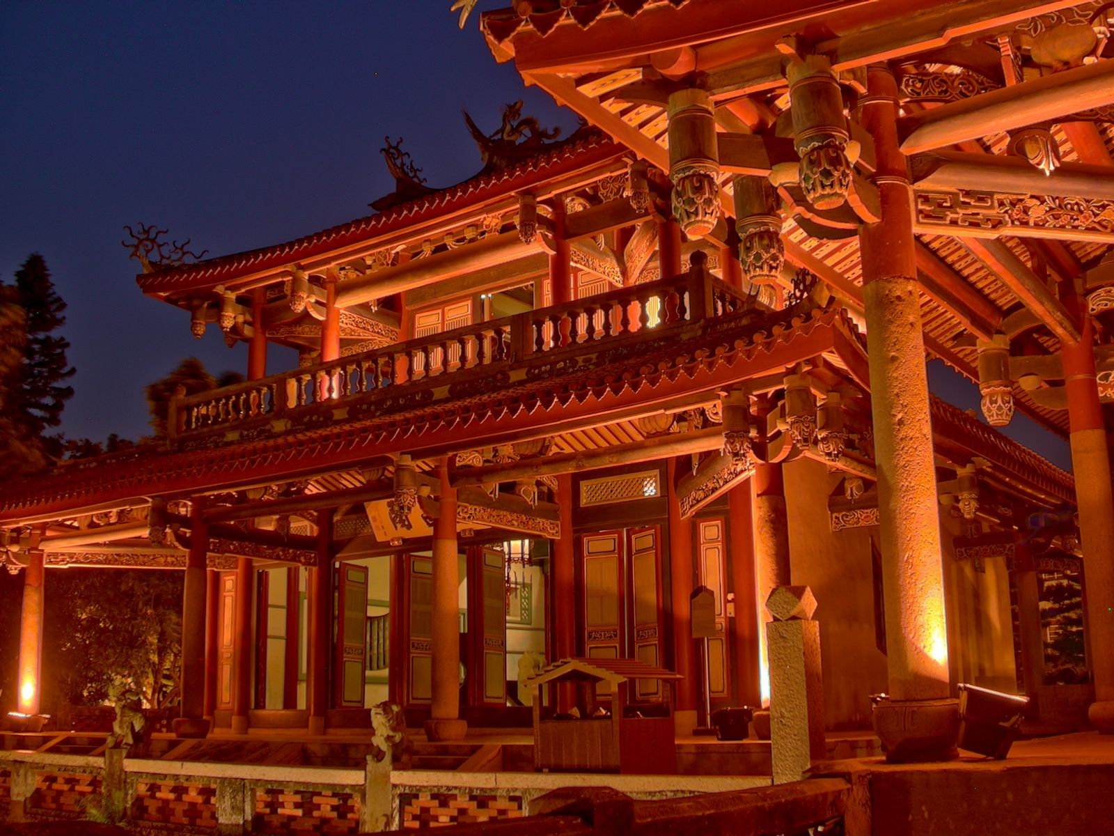 文昌閣